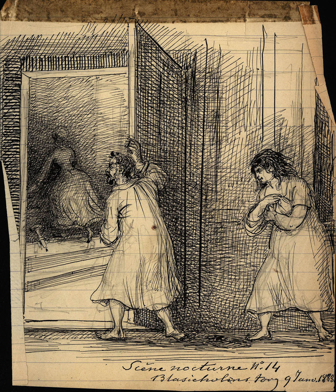 depicted place: Stockholm, Blasieholmstorg (Sverige (SE))